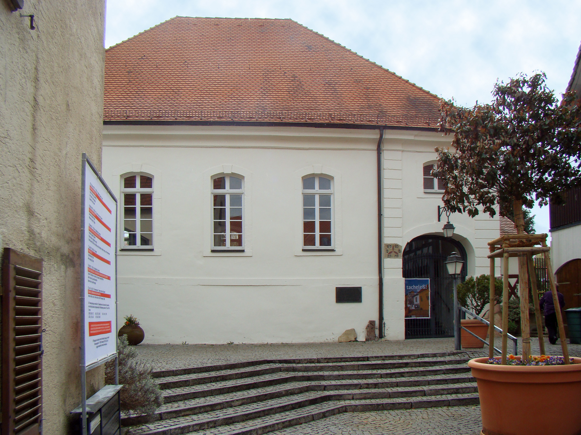 Ehem. Synagoge in Freudental (Lkr. LB)